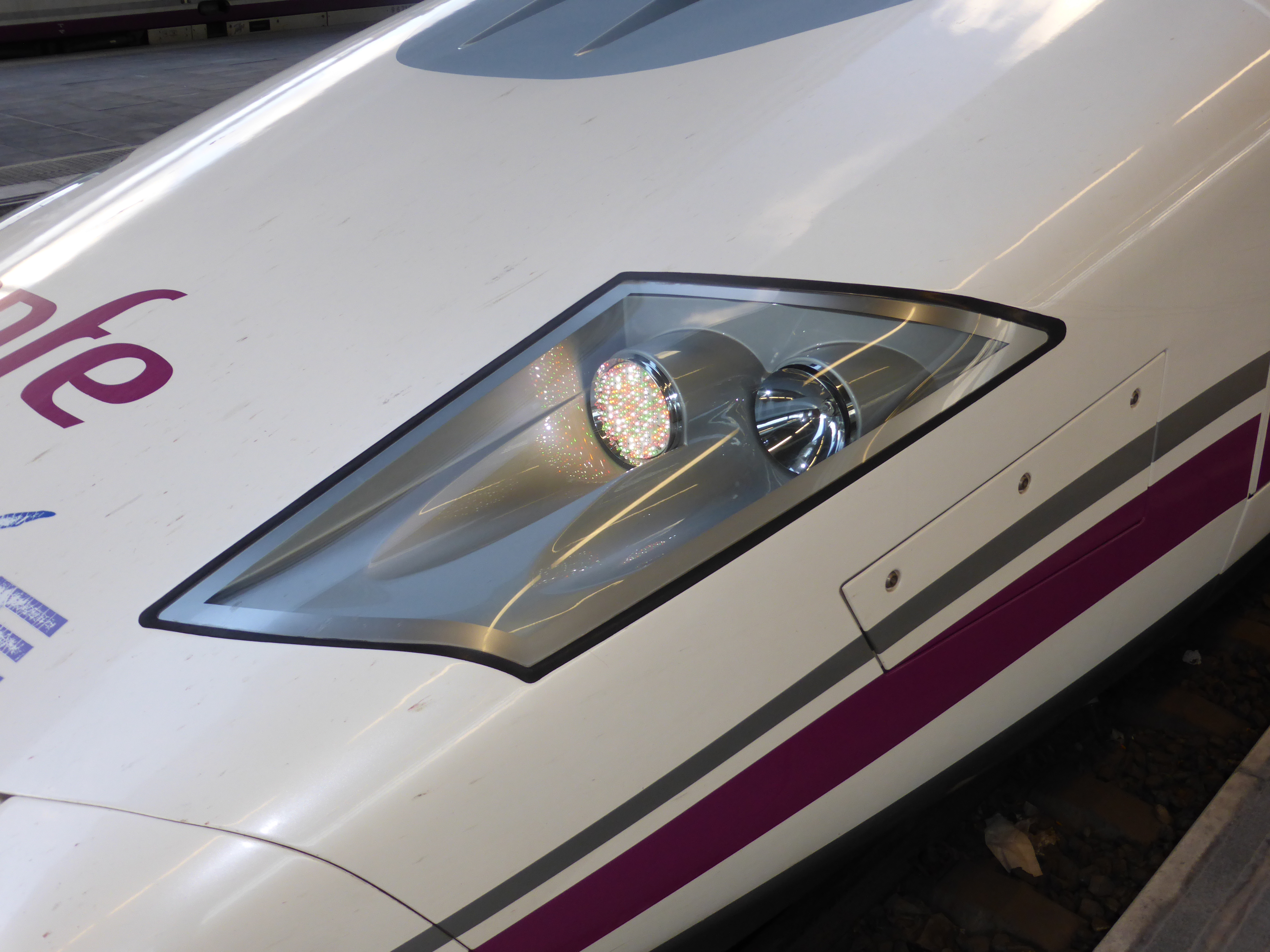 Detalle de la locomotora "Pato", de Bombardier, a la cabeza de un tren AVE (Alta Velocidad Española), de la Serie 112 de Renfe. Línea Madrid-Valencia.